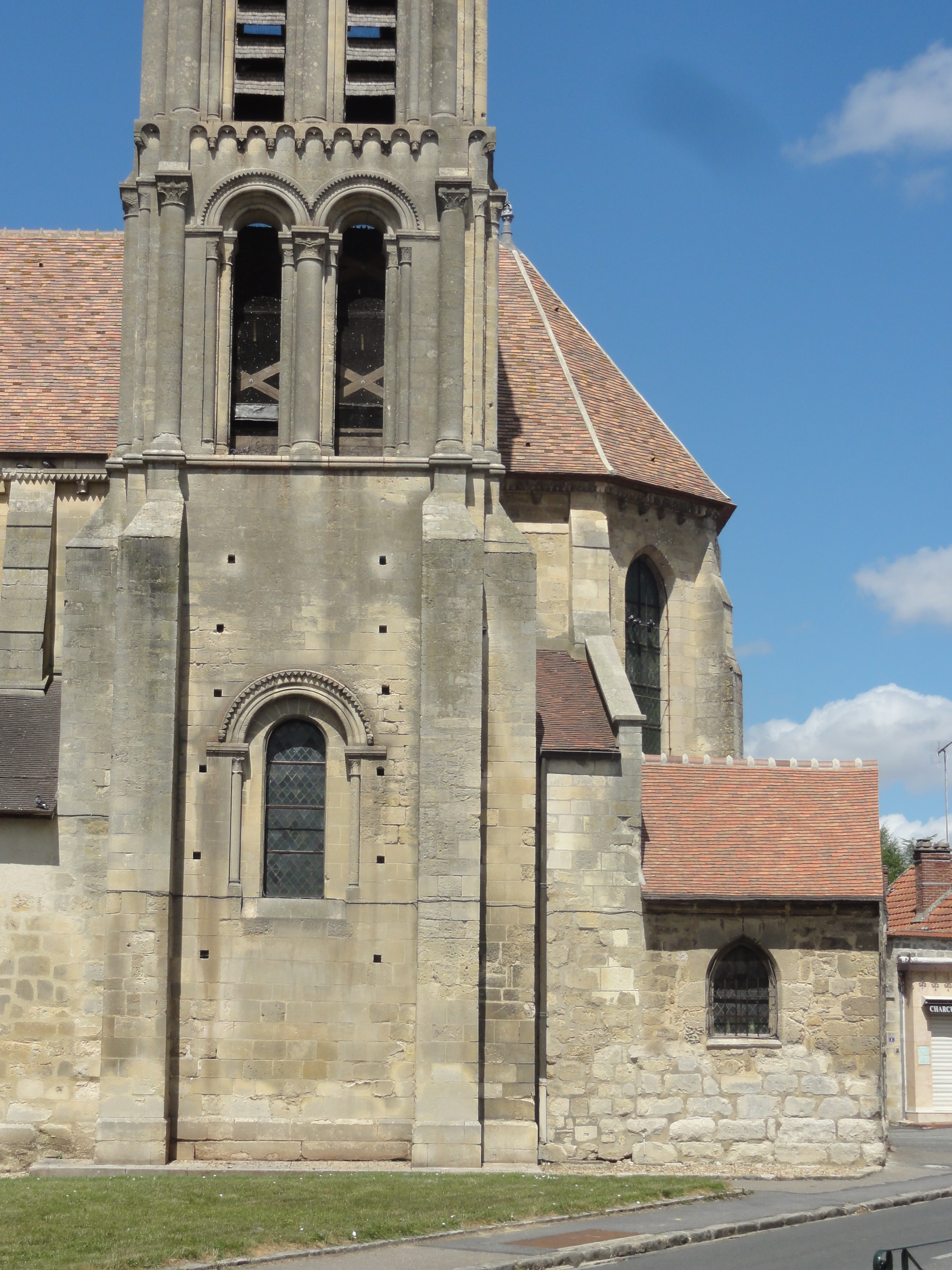 Base du clocher.